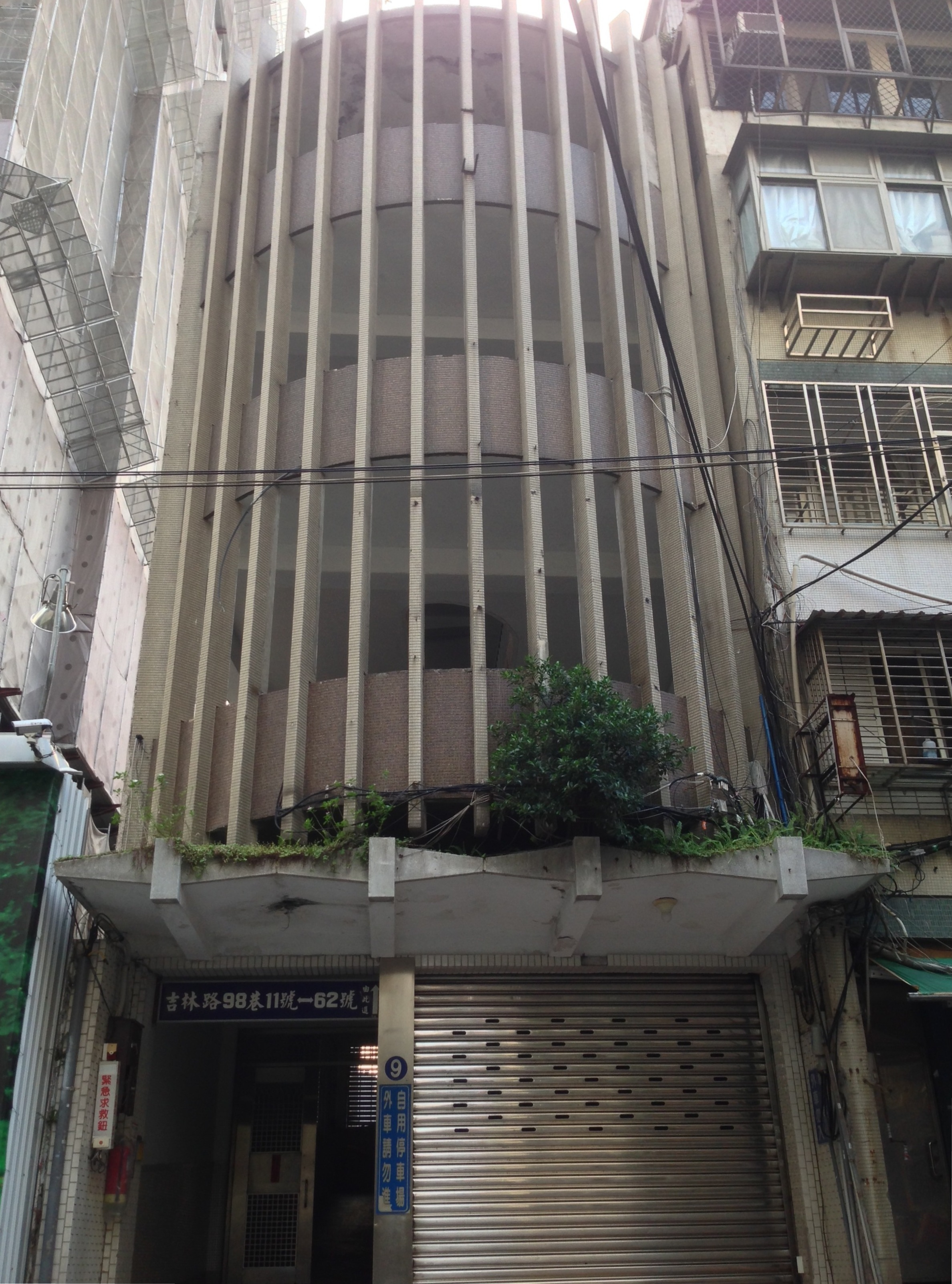 中文（台灣）: 吉林路機車道公寓機車塔外景